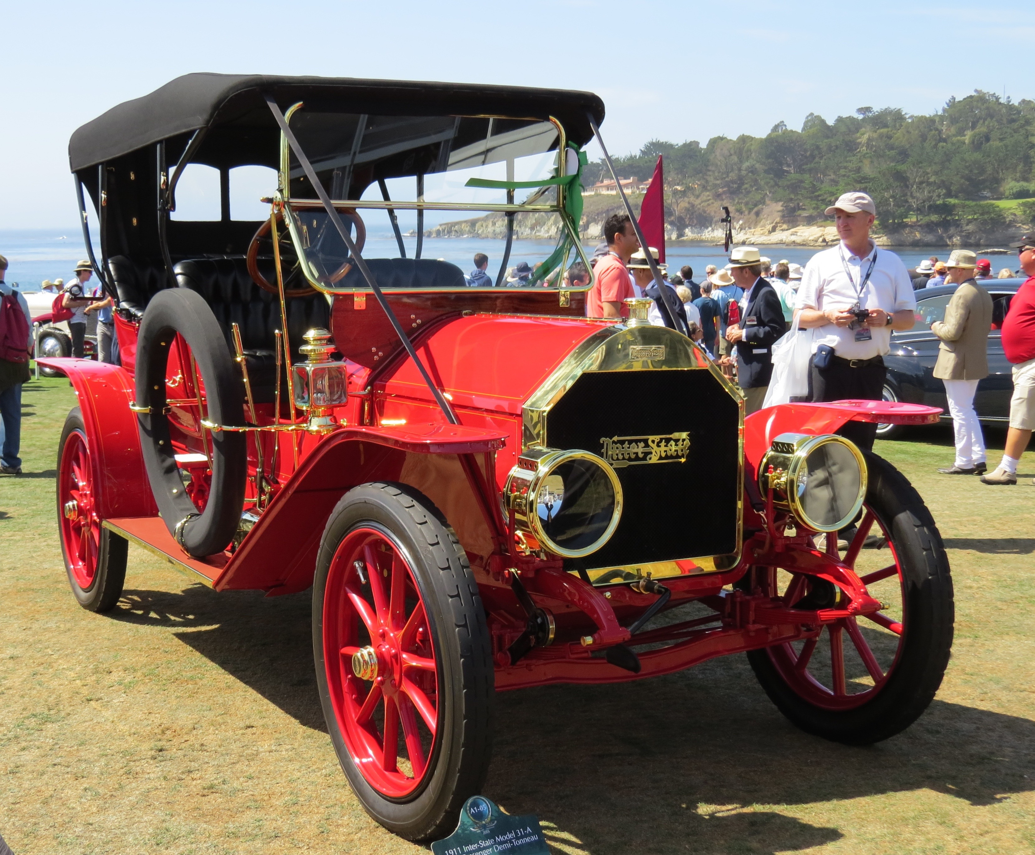 1911 Inter-State Model 31-A Demi-Touring Pebble Beach 2015